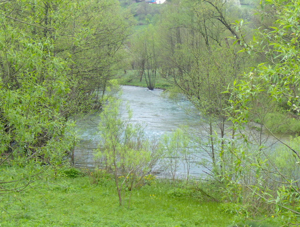 Rijeka Janj u naselju Mujdžići kod Šipova.